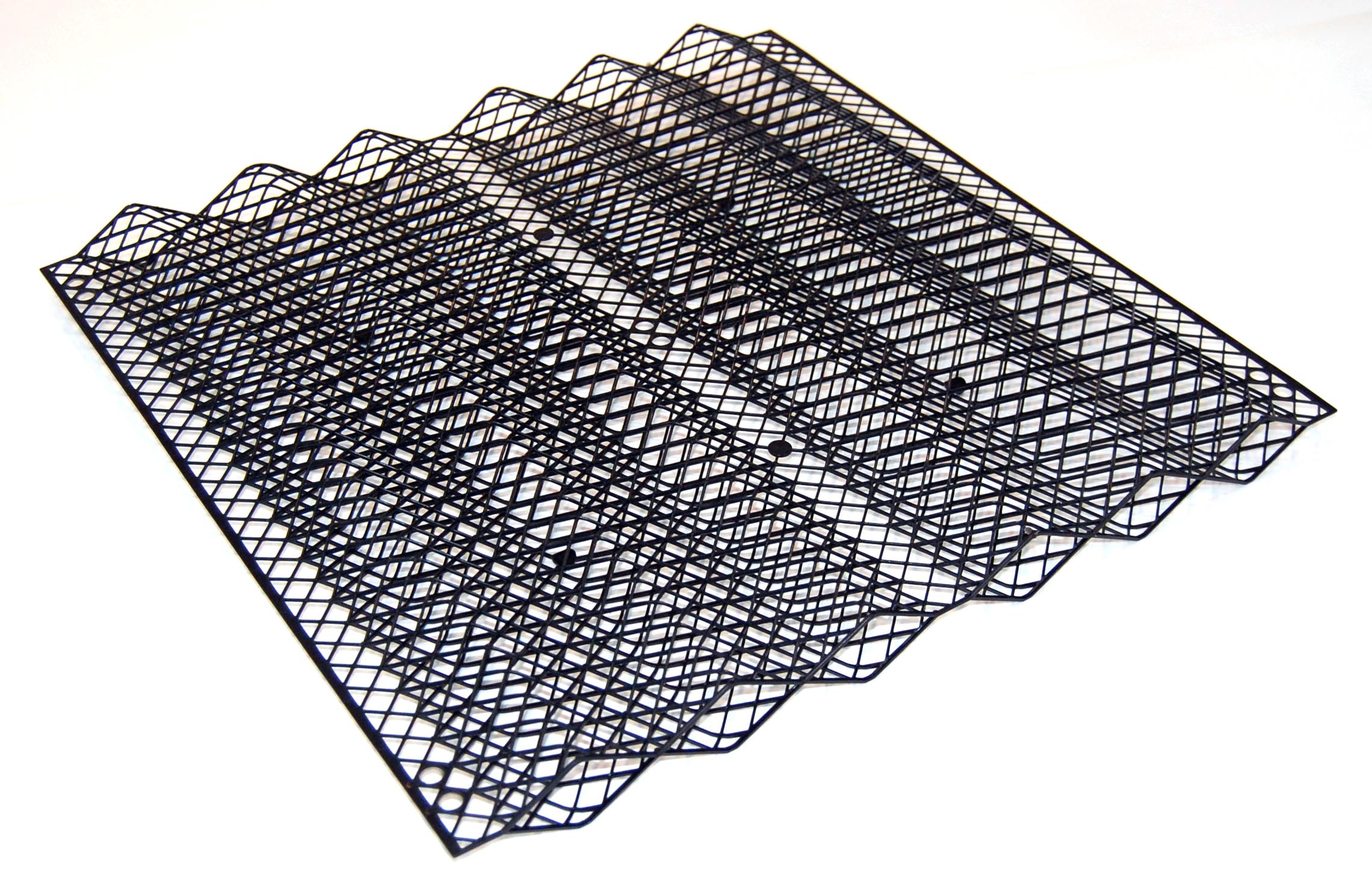 2.Ороситель капельно-плёночный БНС 5.5.5.